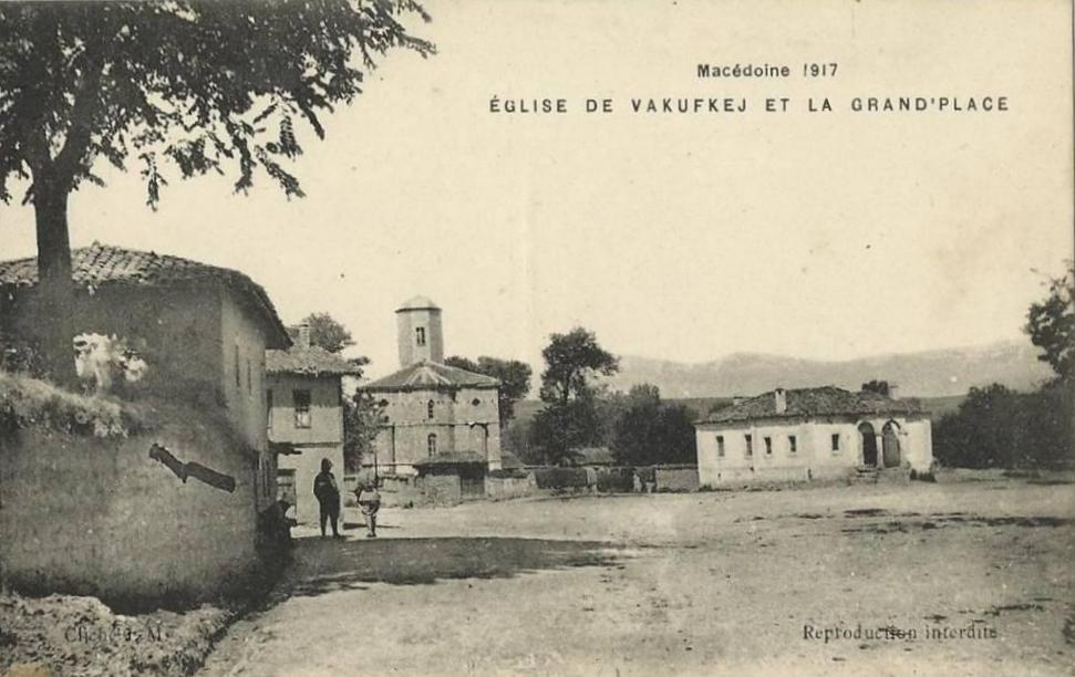 Къщи в Негочани през Първата световна война